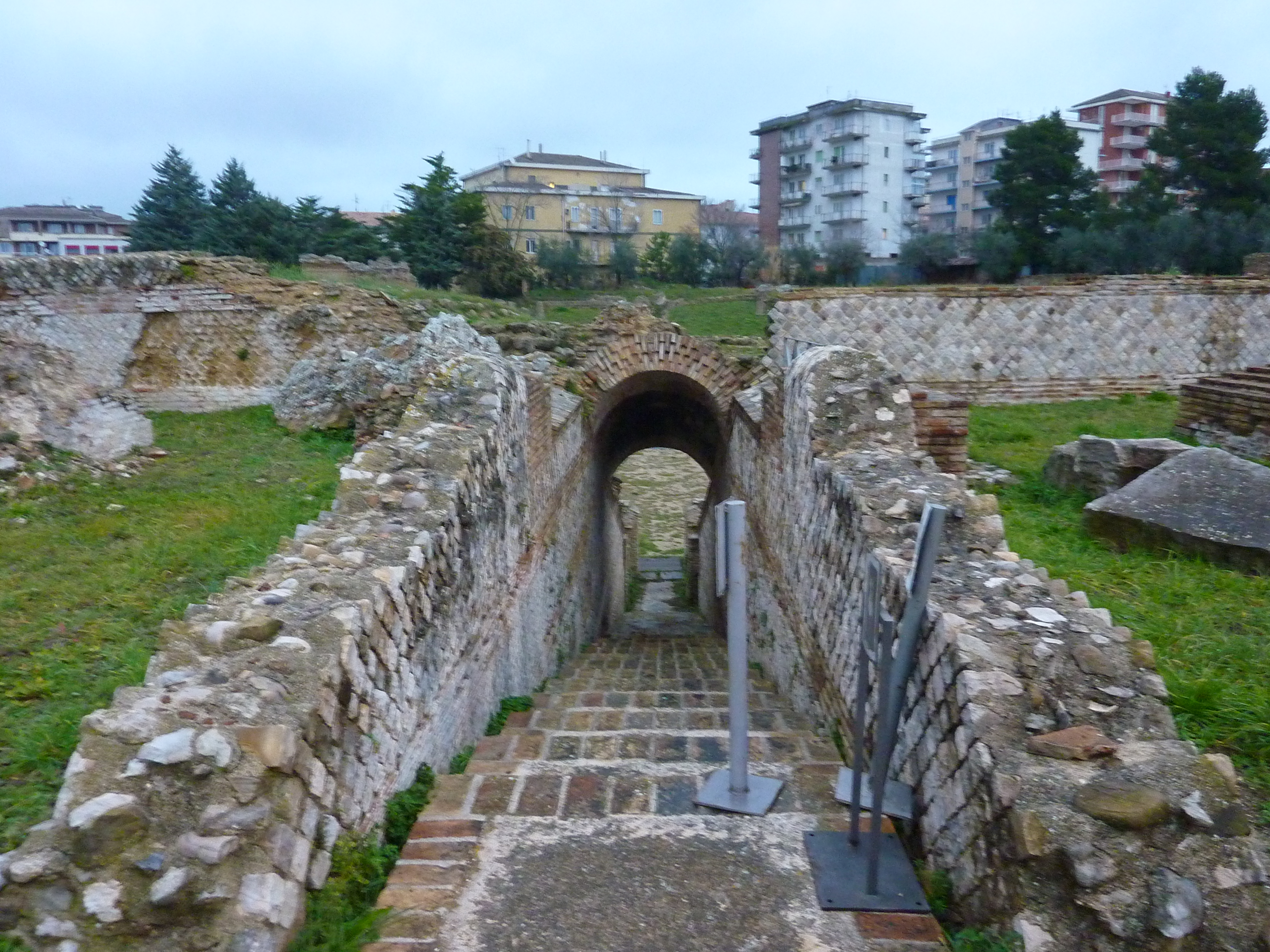 Anfiteatro, Larino